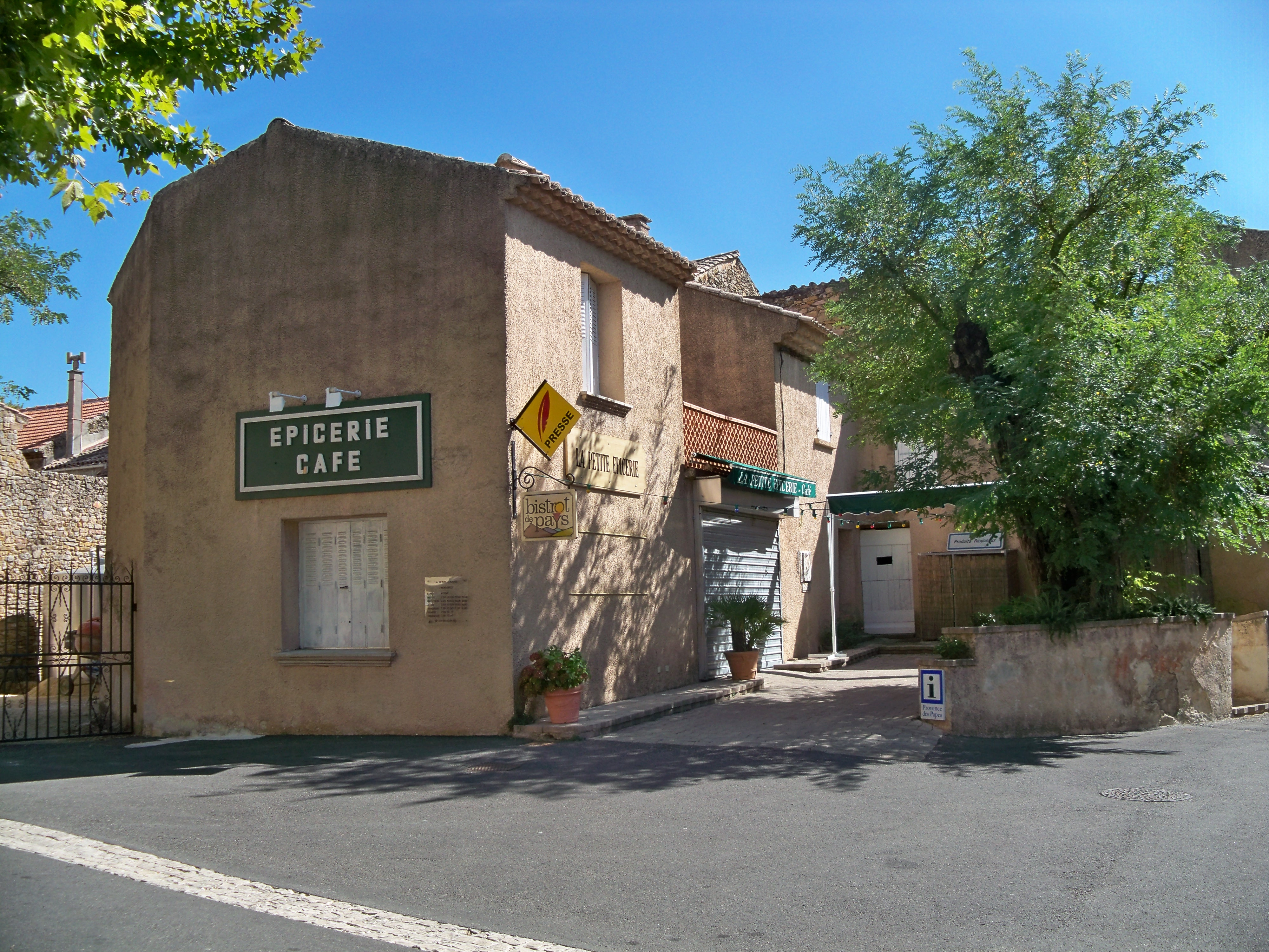 Bistrot de Pays à Uchaux, Vaucluse, France